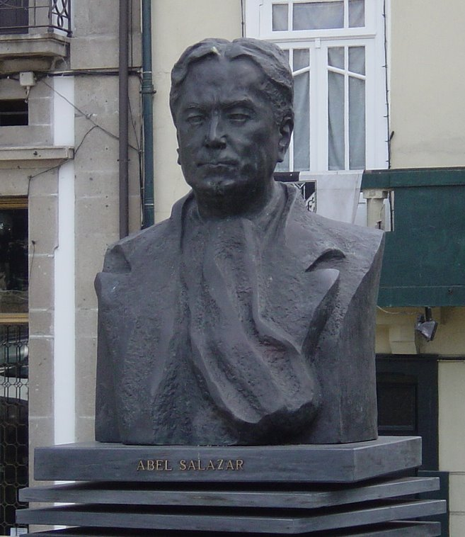 Abel Salazar